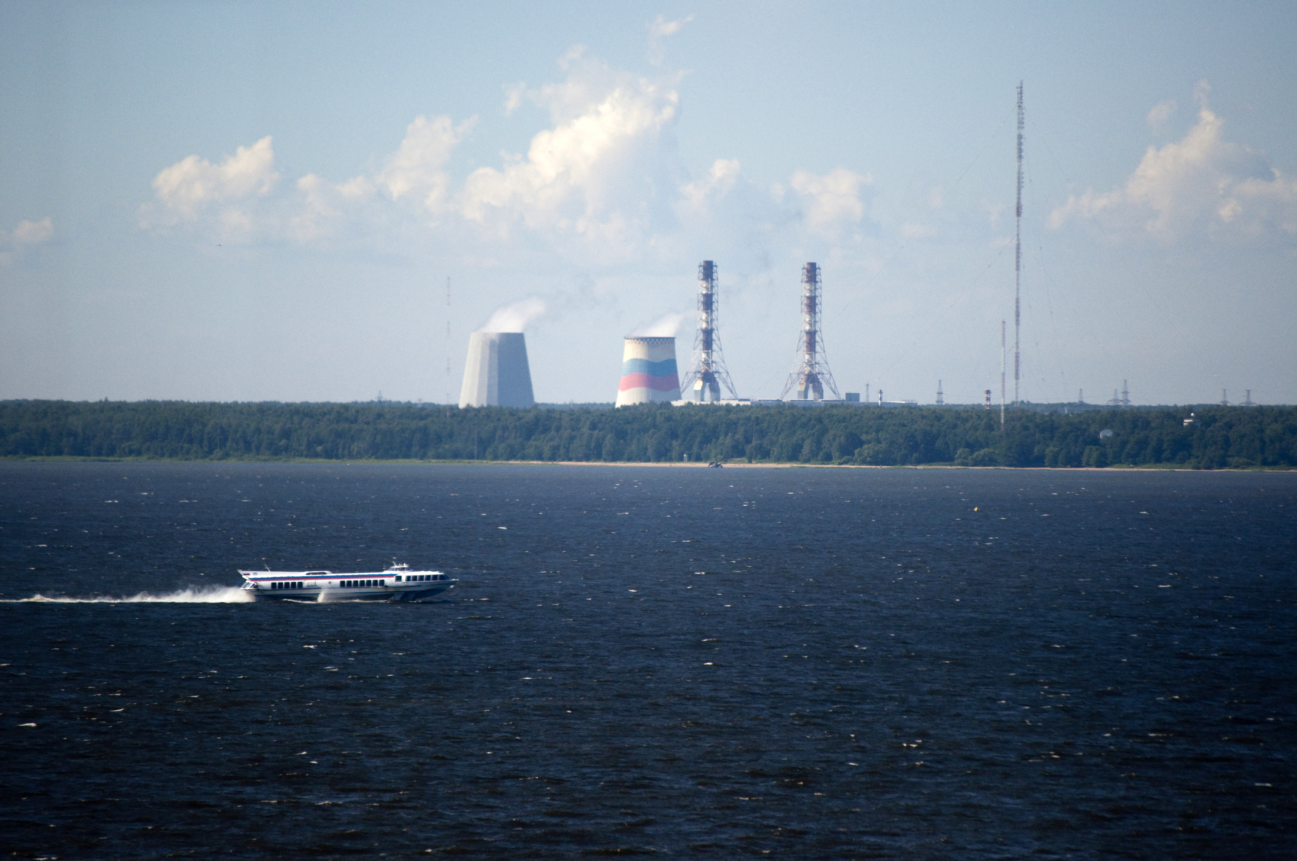 Северо-Западная ТЭЦ и мачты радиоцентра № 1